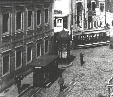 Término base do Elevador da Graça, no largo do mesmo nome, em Lisboa. (Inclui elétrico CCFL.)